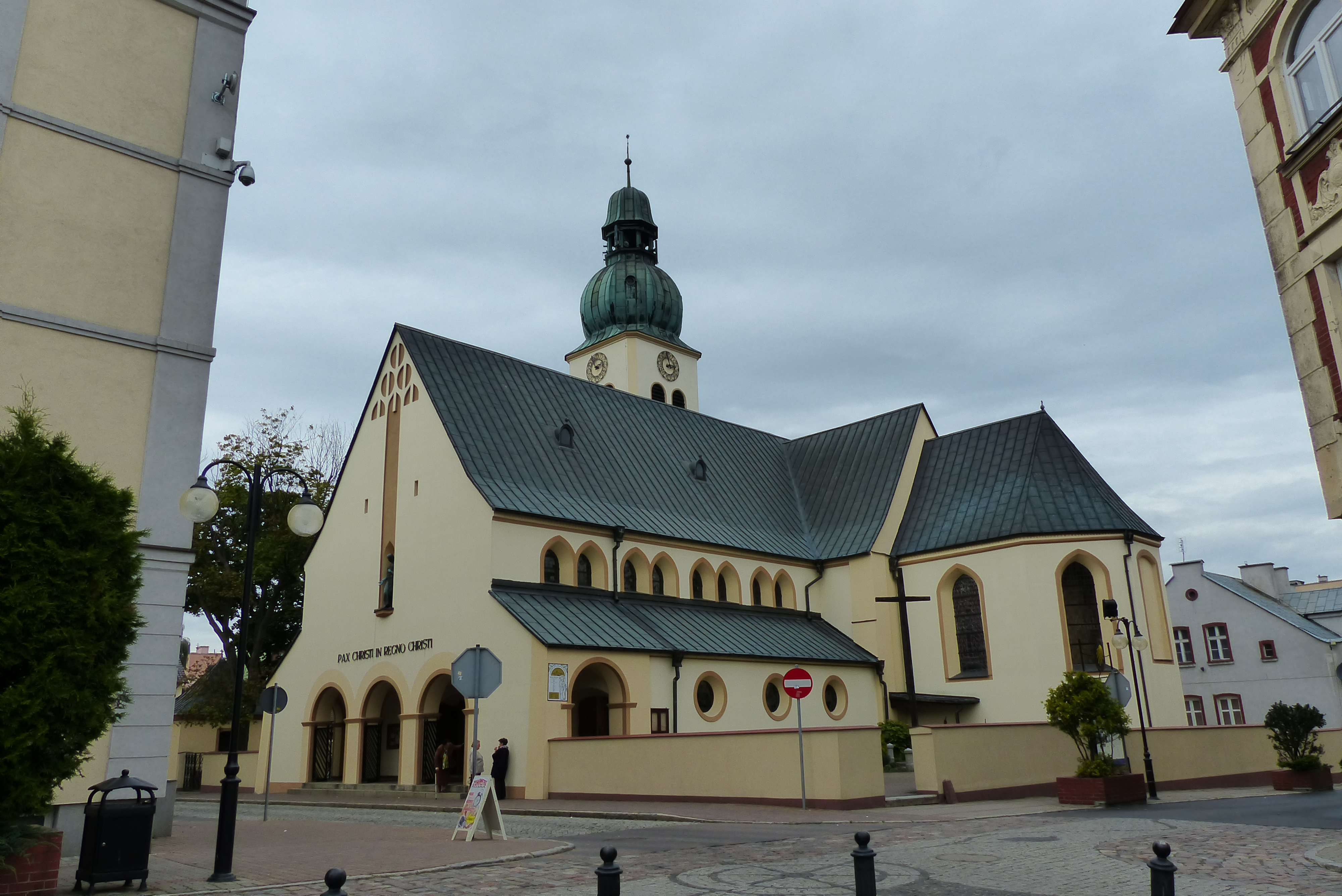 Człuchów, ul. Królewska 6 - rzymskokatolicki kościół parafialny p.w. św. Jakuba Apostoła, 1644-1647, 1926-1928